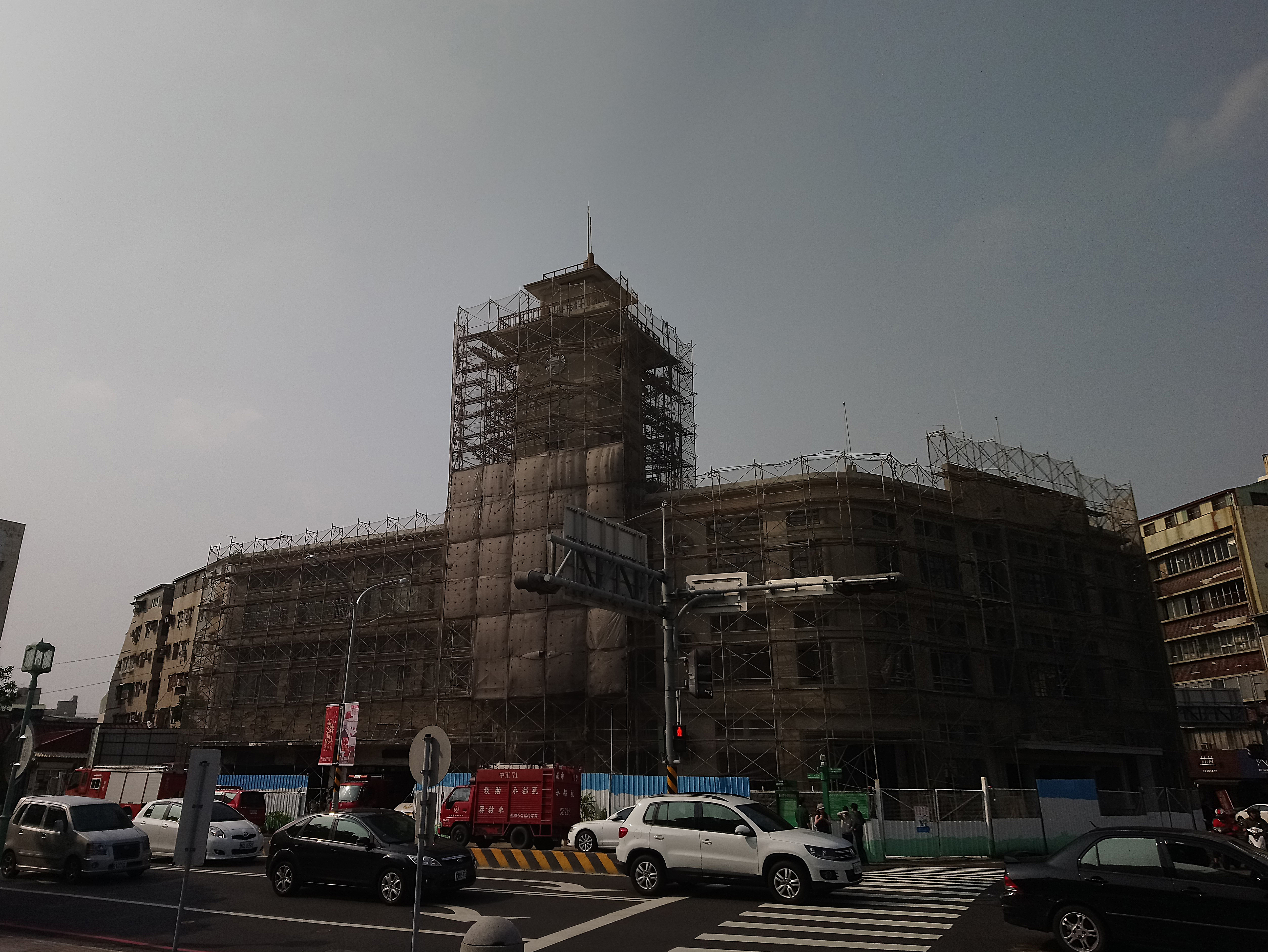 整修中的原臺南合同廳舍,臺南市中西區永華里